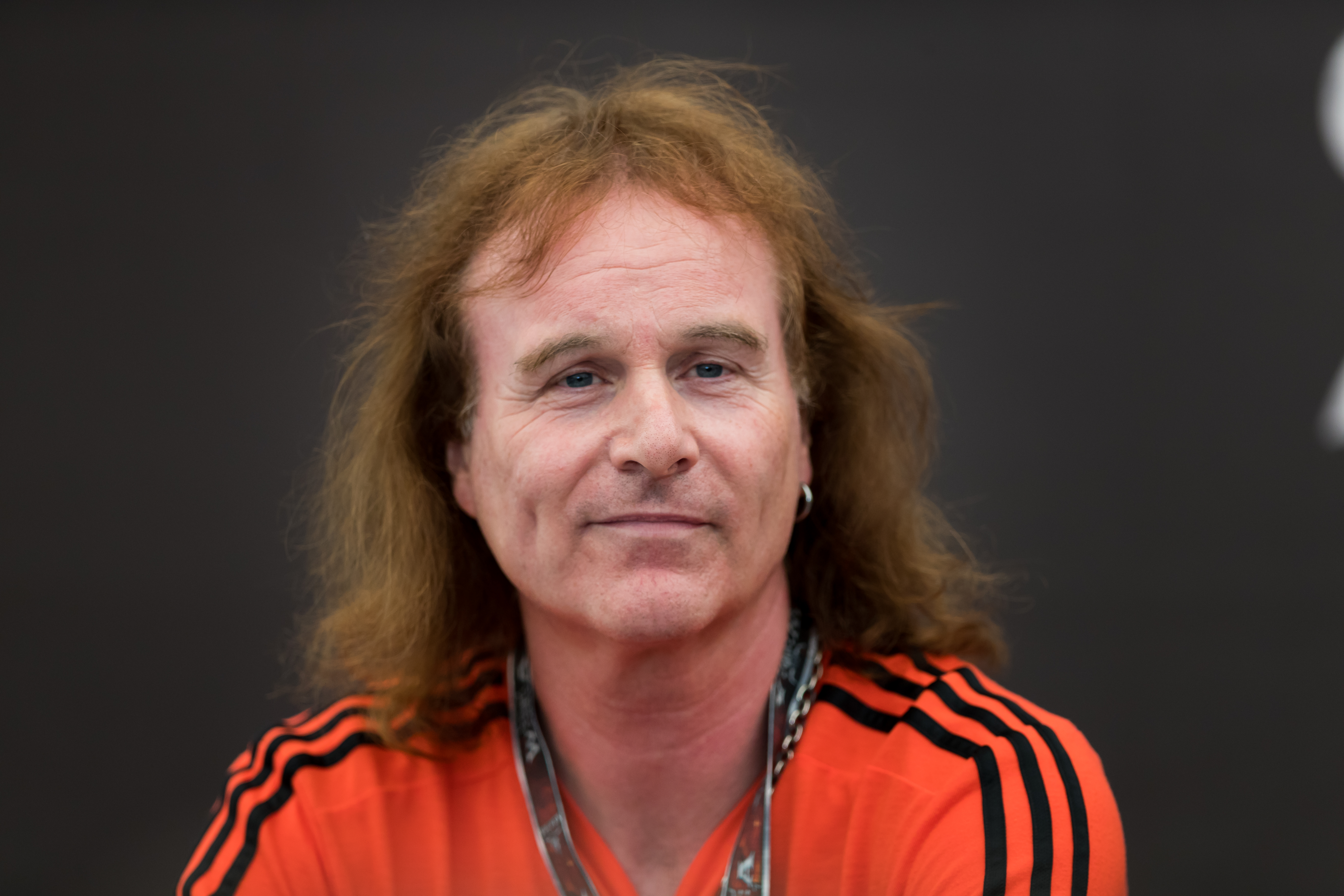 Rolf Kasparek during Wacken Open Air at Schleswig-Holstein, Wacken, , Germany on 2017-08-05, Photo: Sven Mandel